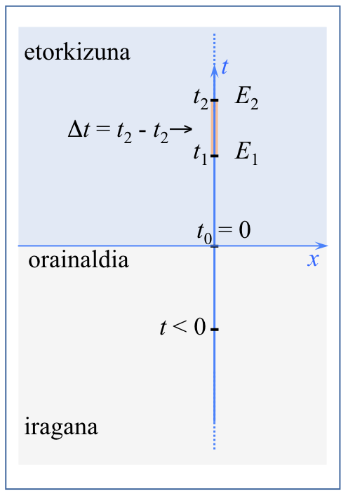 Pausagunean dagoen behatzailearen denboraren lerroaren adierazpen grafikoa